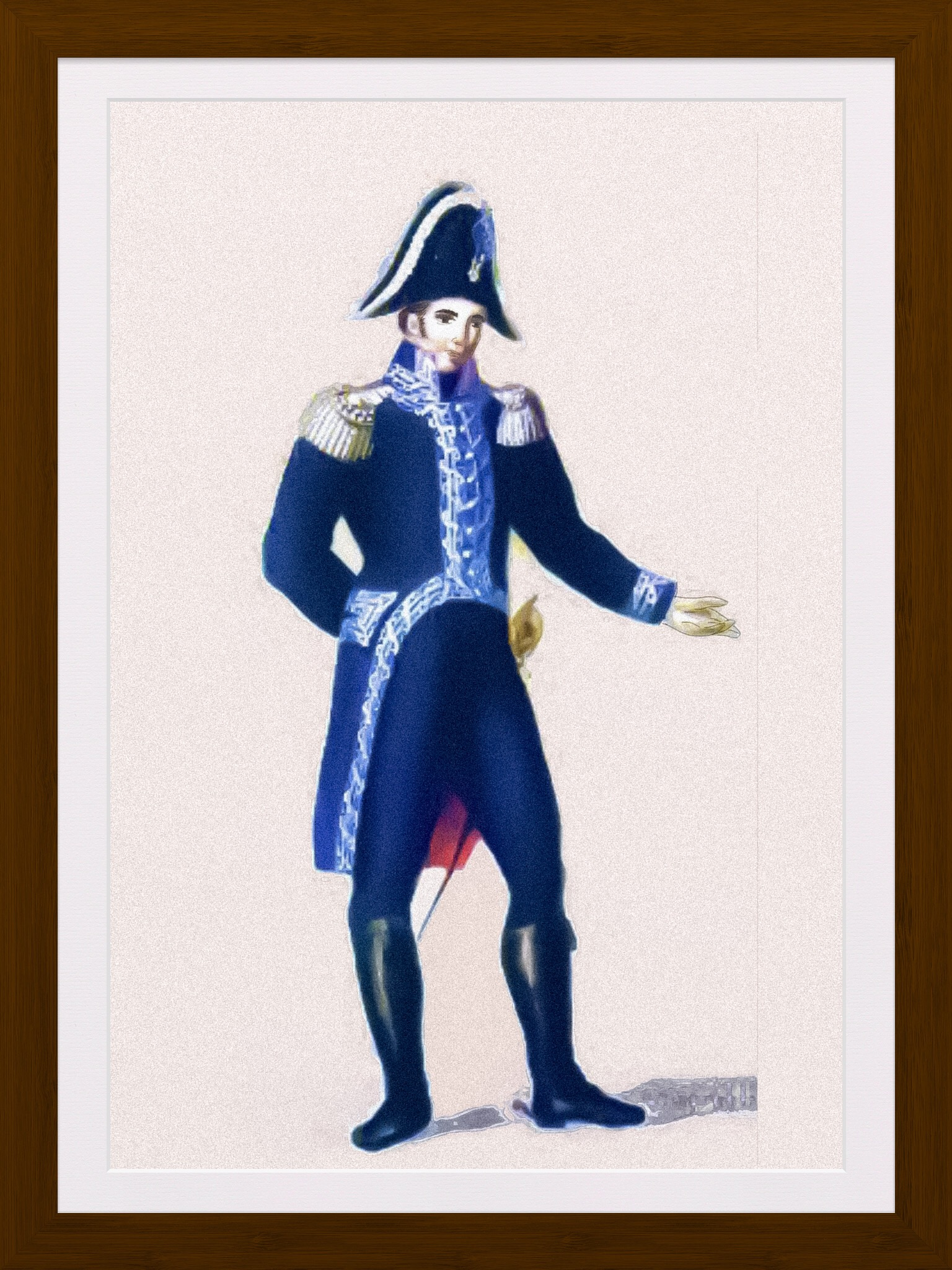 Uniforme turchina da generale sabaudo inizio XIX secolo